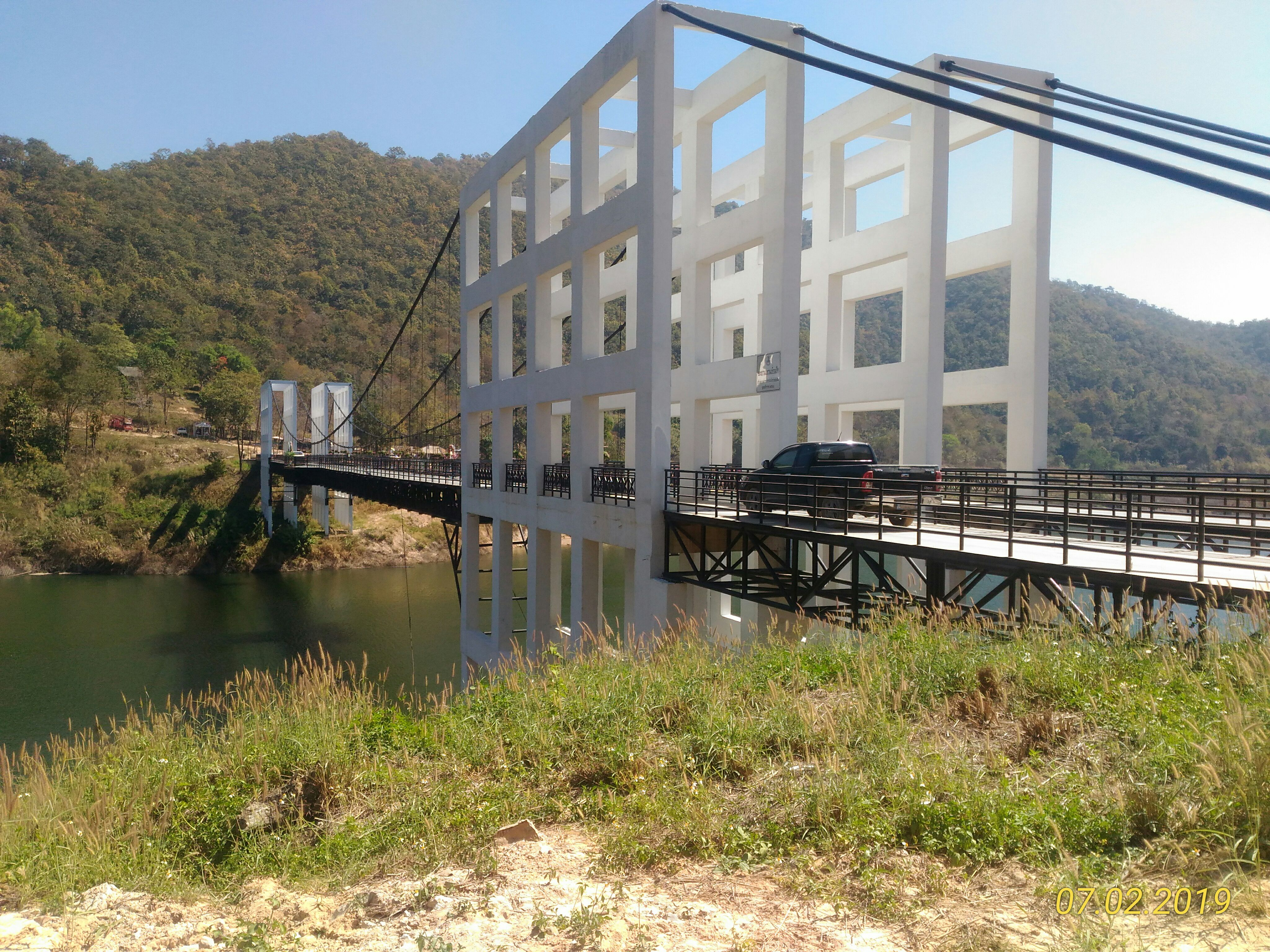 Brug tussen twee oevers van een stuwmeer nabij Doi Saket, gezien vanaf de westelijke kant.